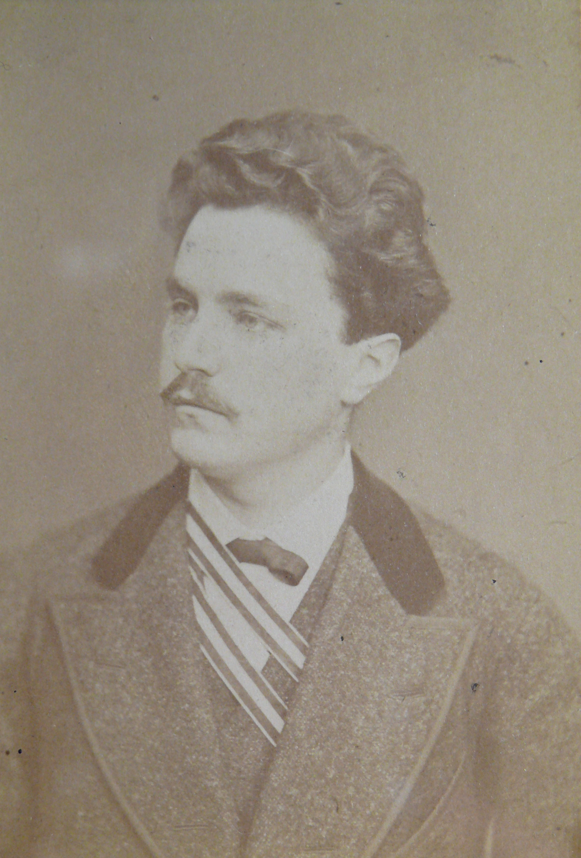 Porträtfotografie von Gustav Ebbinghaus